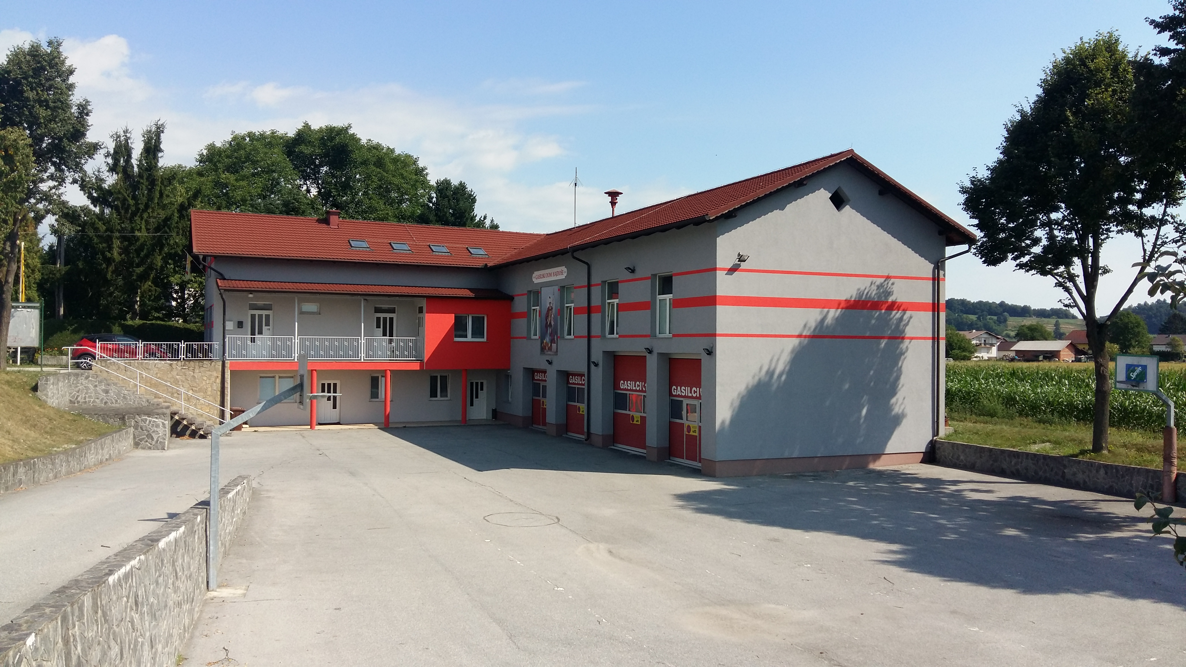 Gasilski dom Hajdoše